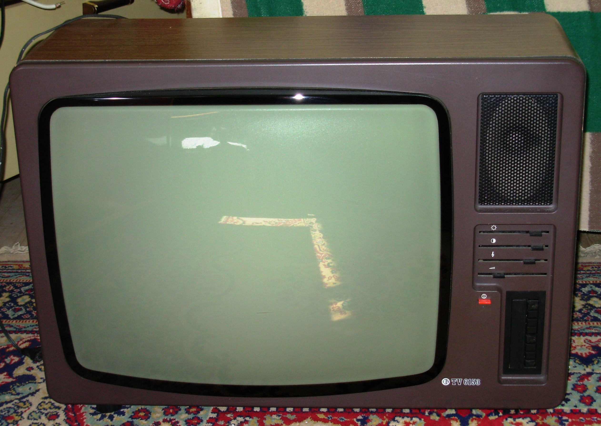 Crno-beli televizor iz 1970. Proizvođač EI, 6 kanala bez daljinskog upravljanja. Slikao Goldfinger